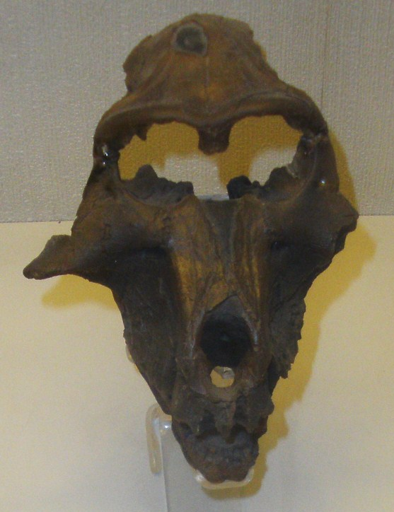 Fossil of Theropithecus, an extinct mammal -- Topok the picture at Museo di Paleontologia di Firenze